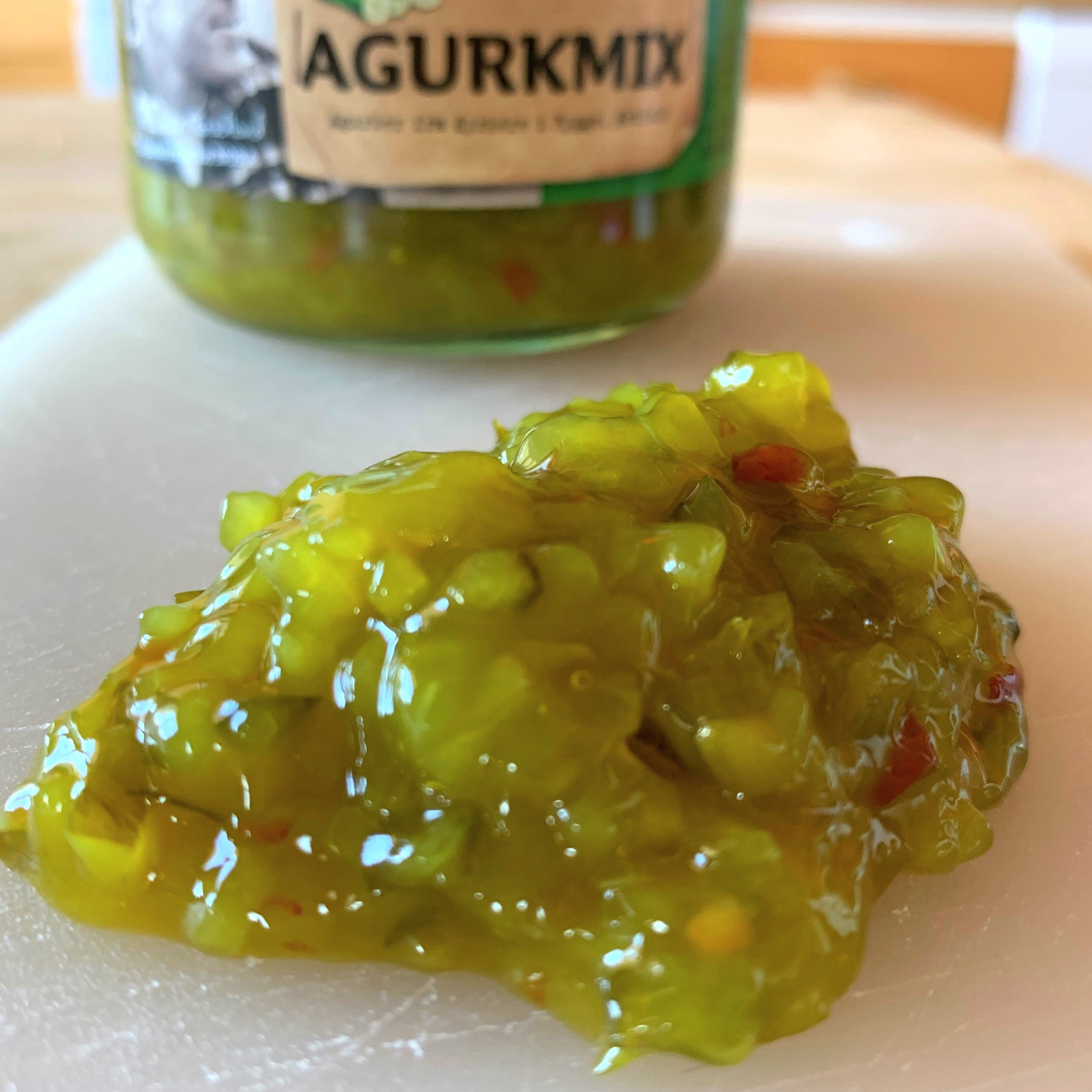 Agurkmix fra Nora.